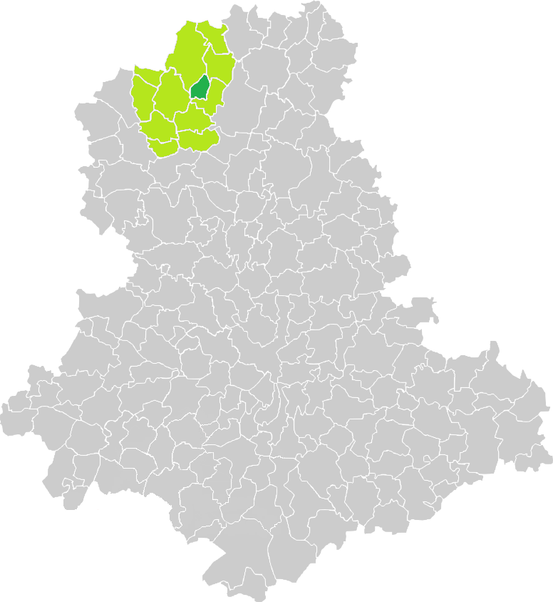 Carte de situation de la commune de La Bazeuge (en vert foncé) dans le votre Canton (en vert clair) sur une carte des communes de la Haute-Vienne